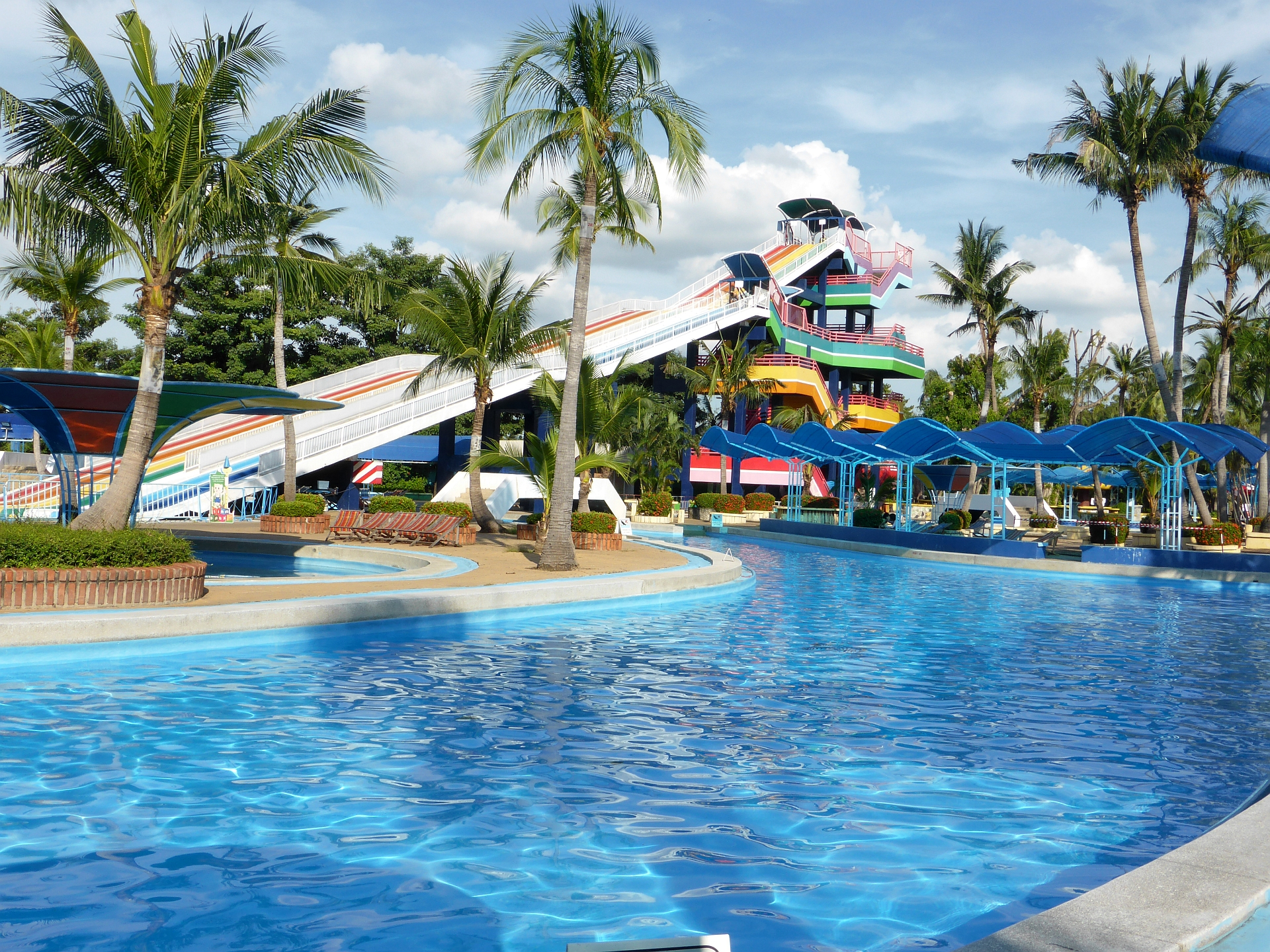 Siam Park City (Bangkok), 10.11.2016